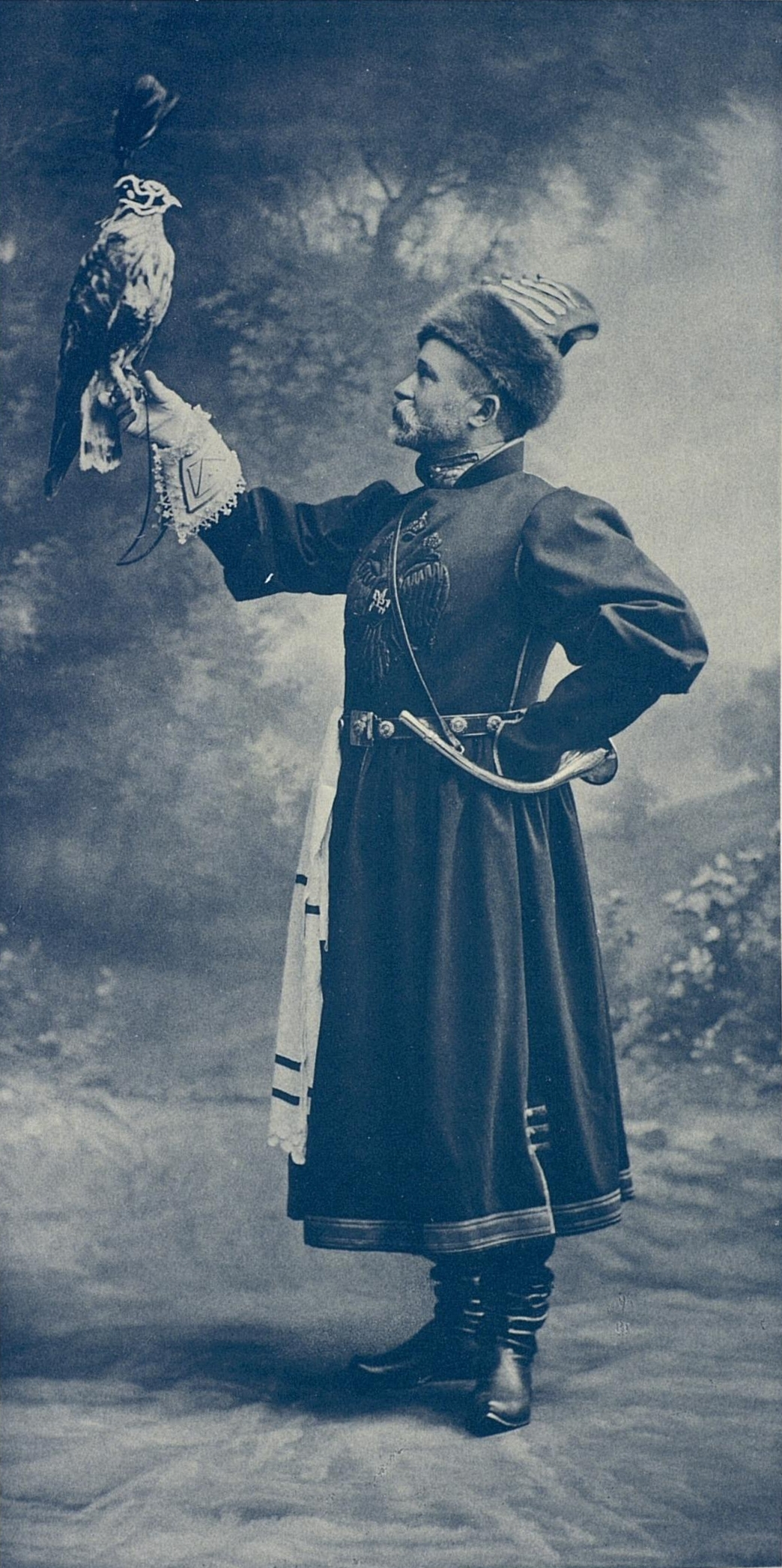 Генерал - майор Николай Иванович Кутепов, заведующий хозяйственной Императорской охоты, в одеждах рядового сокольника Царя Алексея Михайловича.